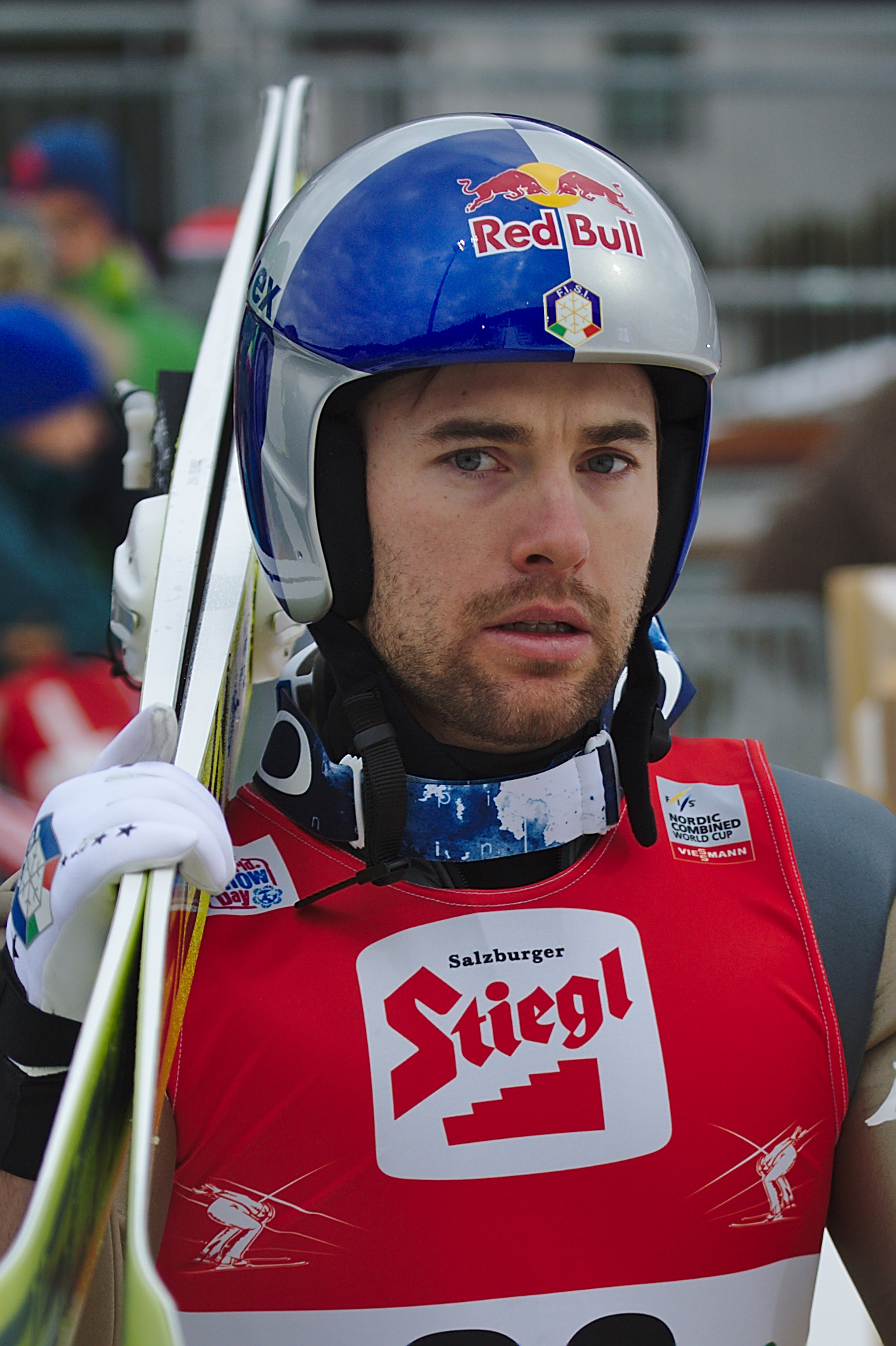 FIS Worldcup Nordic Combined Ramsau 2016. Bild zeigt Alessandro Pittin (ITA)